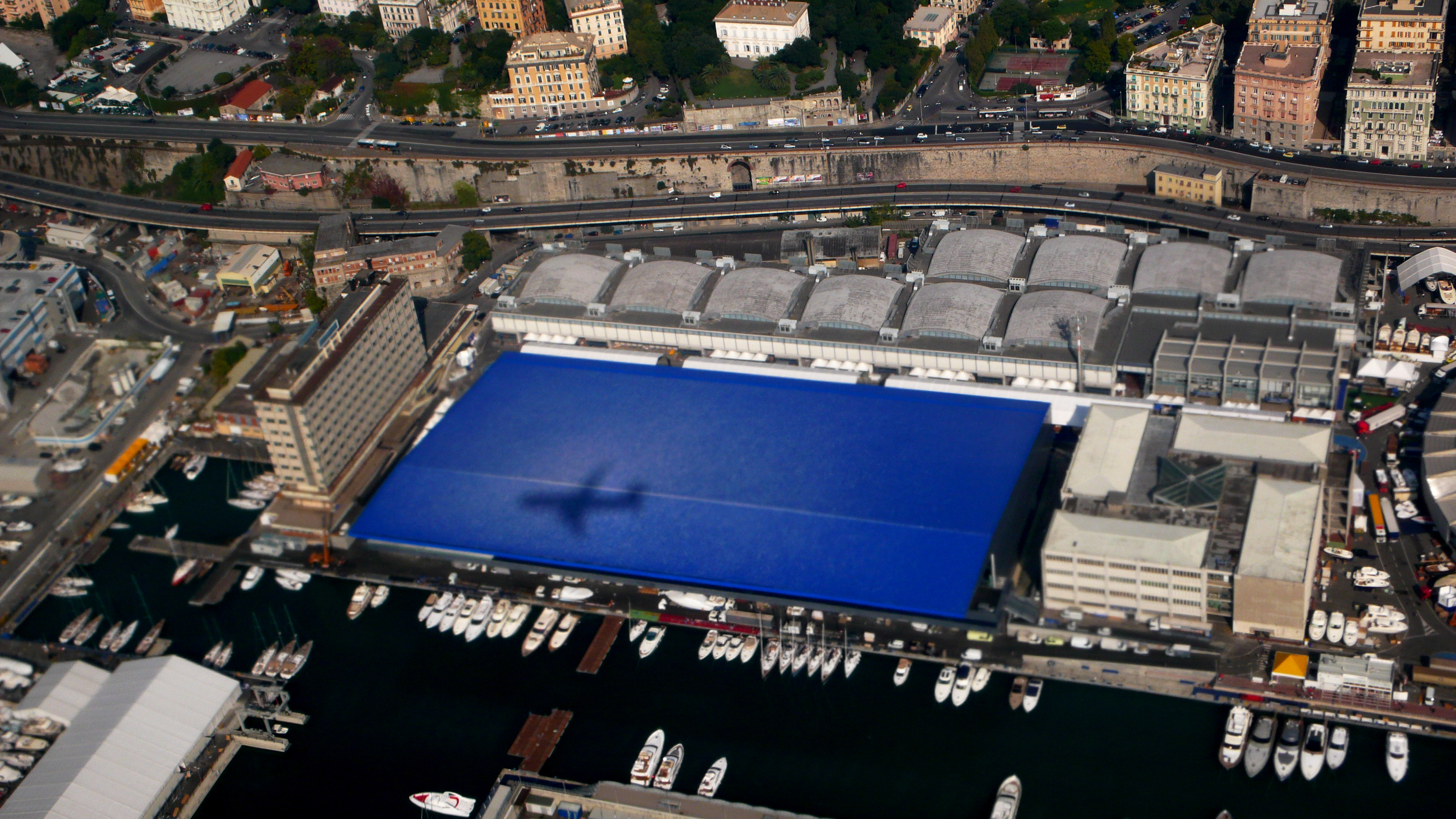 Genova Fiera del Mare @ GENOA INTERNATIONAL BOAT SHOW vista dall'aereo